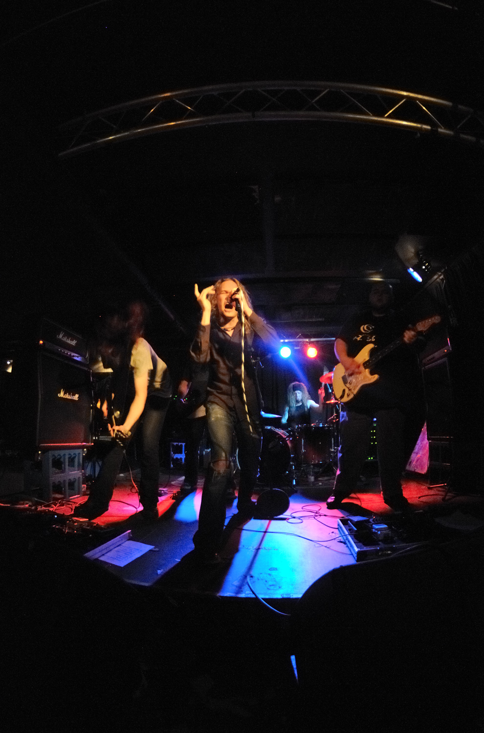 Jukka Ruostila & Kaaoksen Ystävät Pub Katseessa, Jyväskylässä 13.11.2011.